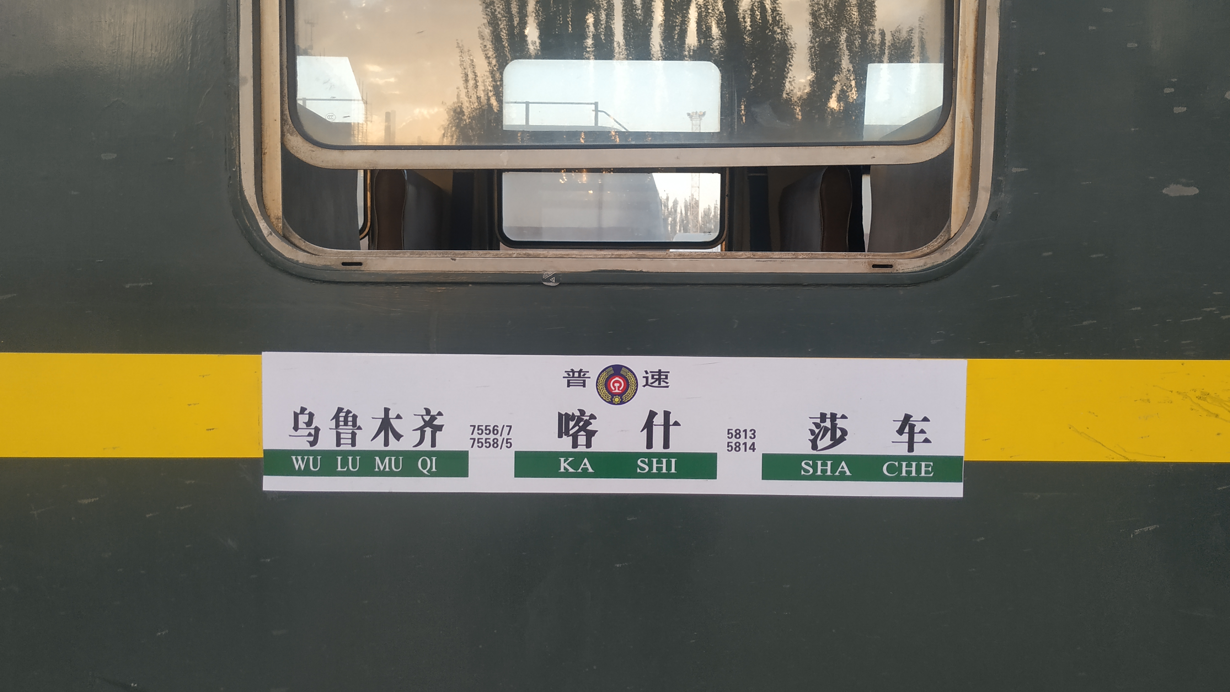 中文（中国大陆）: 7556列车从乌鲁木齐到喀什站